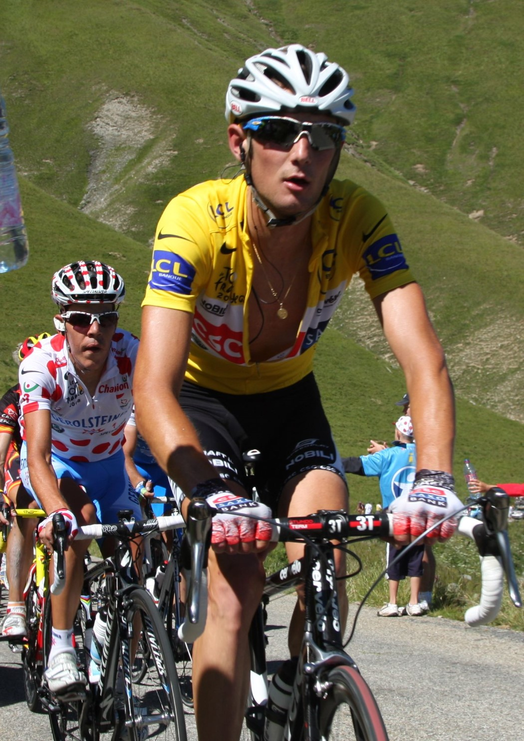 7625 kohl f schleck